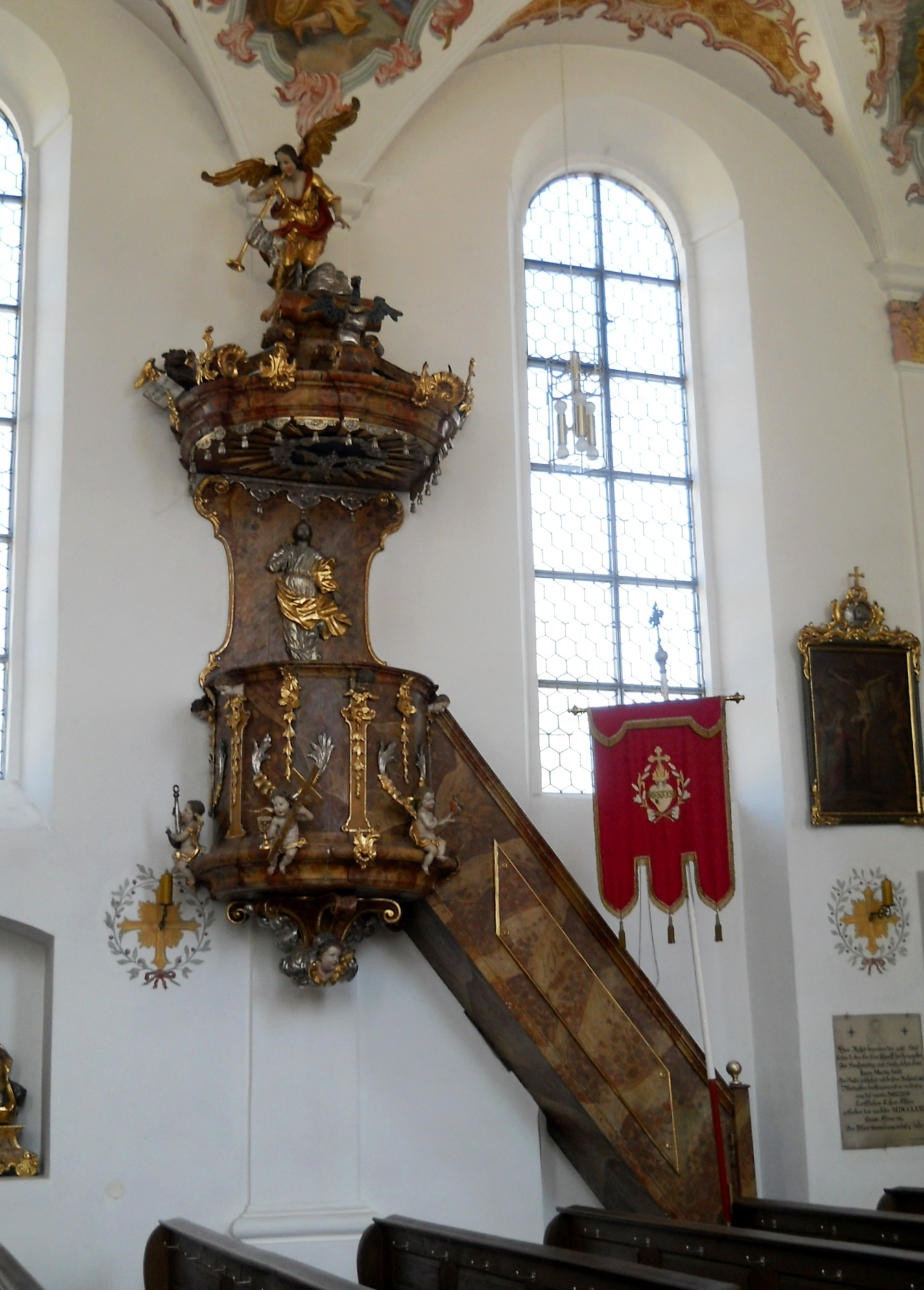 Genderkingen (Landkreis Donau-Ries), Pfarrkirche St. Peter und Paul, Kanzel